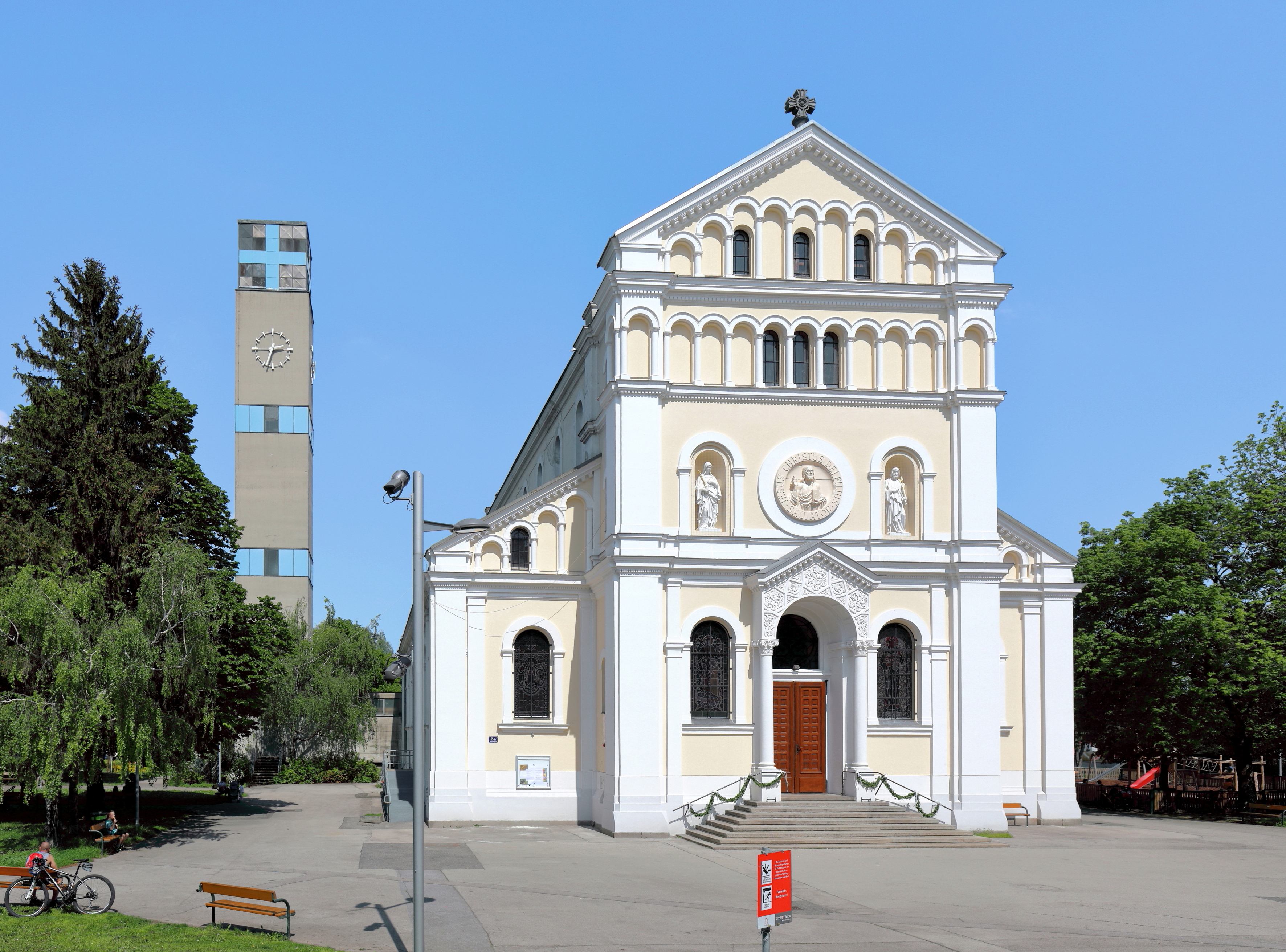 Die Pfarrkirche „Zum göttlichen Herzen Jesu" am Schüttauplatz in Kaisermühlen, ein Bezirksteil des 22. Wiener Gemeindebezirkes Donaustadt.Die dreischiffige Kirche im Stil einer römisch-frühchristlicher Basilika wurde von 1887 bis 1895 nach Entwürfen von Viktor Luntz erbaut und am 28. April 1895 geweiht. Der Glockenturm wurde 1966 nach Plänen von Erwin Plevan errichtet.